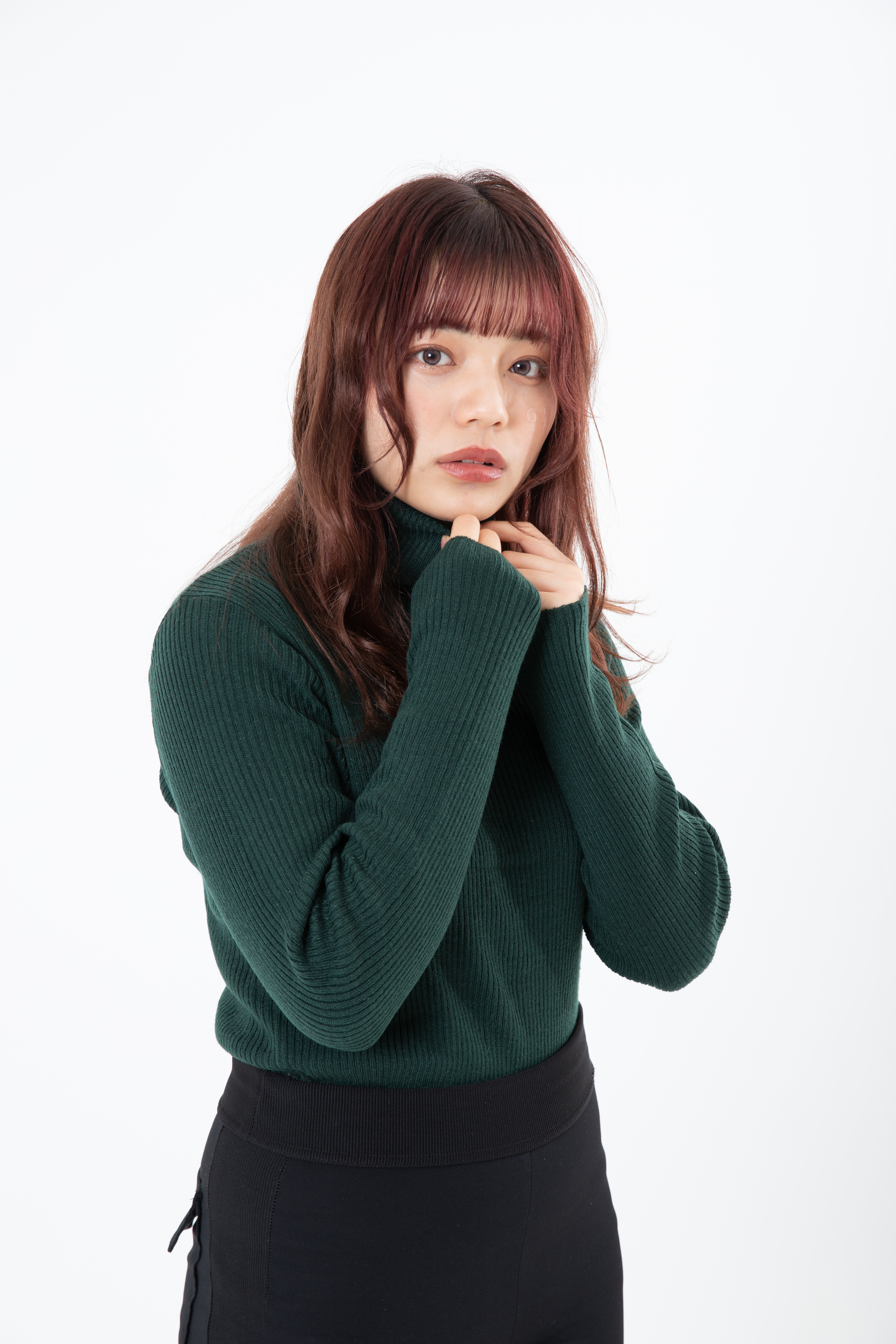 大橋あかり本人、2019年12月写真スタジオにて撮影。